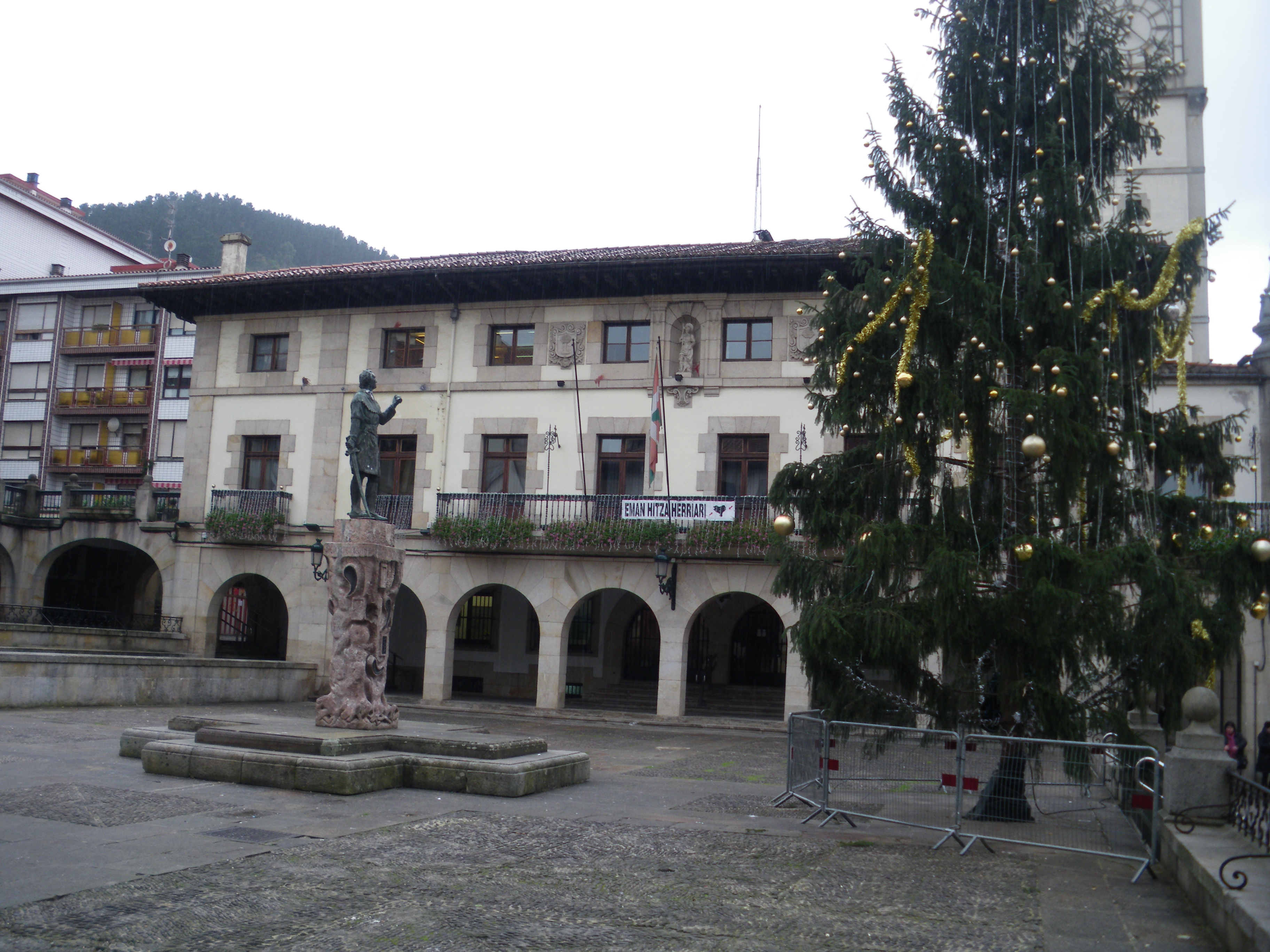 Gernikako kultur eraikina.